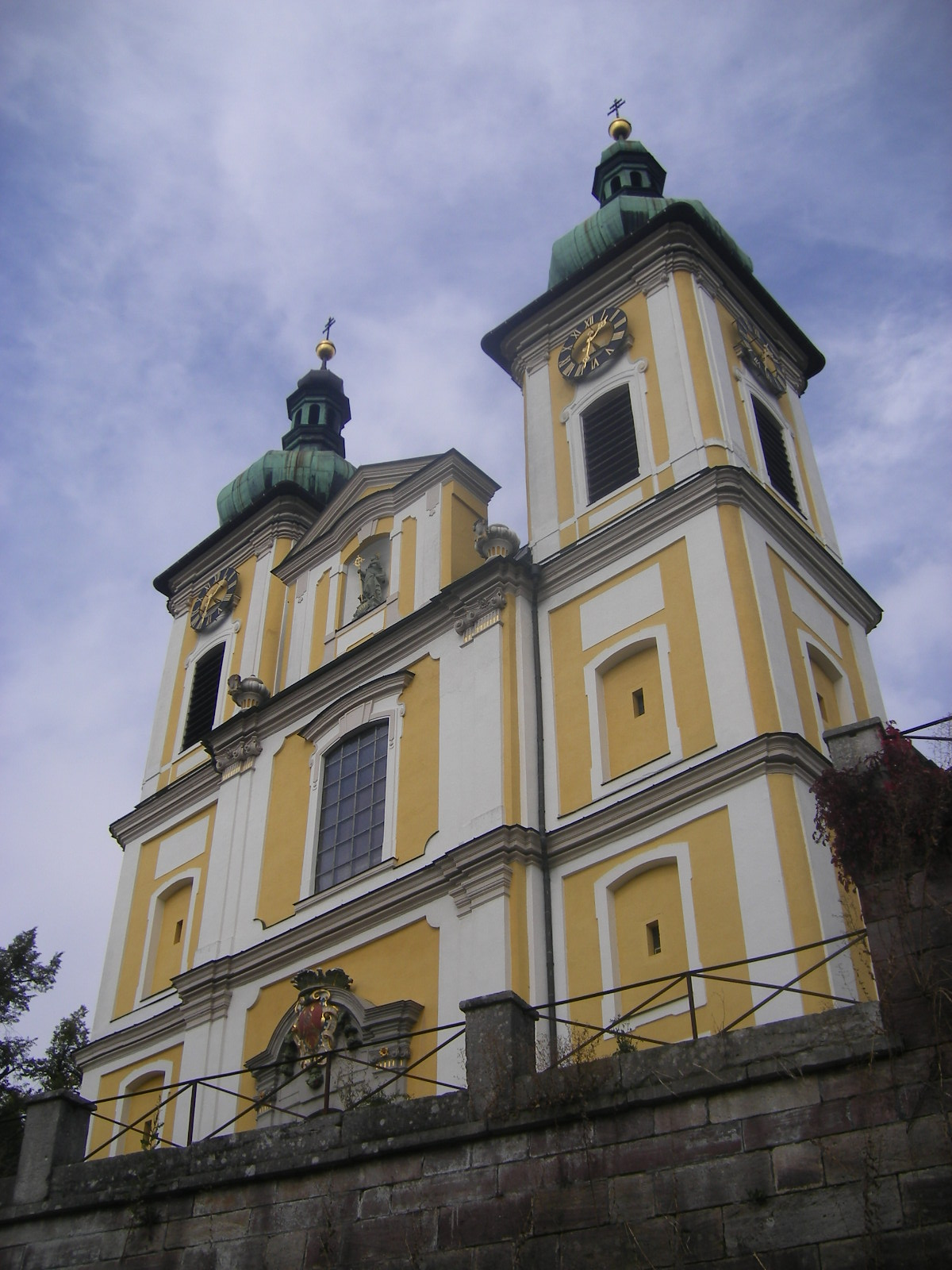 Donaueschingen